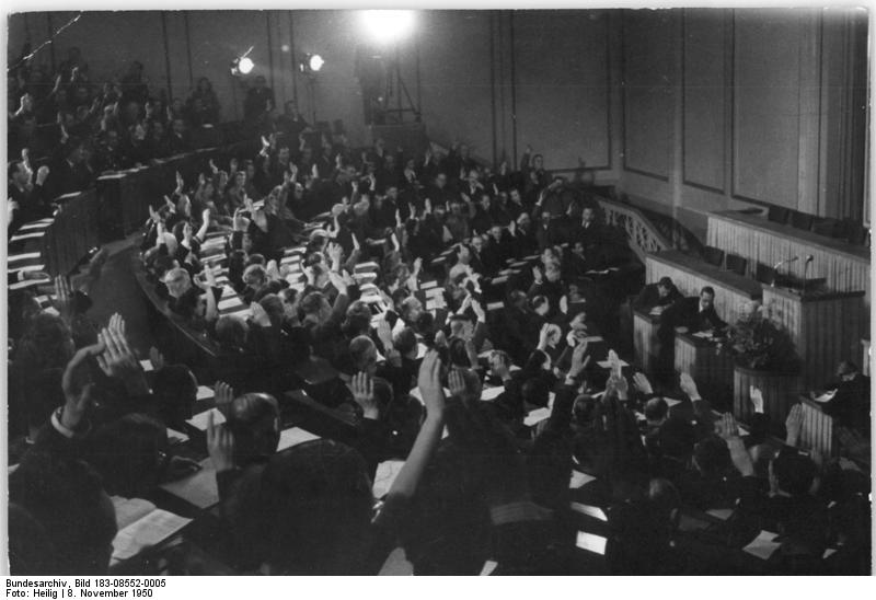 ADN-ZB Heilig Kno-Schm 8.1.50 1. Sitzung der Volkskammer. Am 8.11.50 fand im Haus der Volkskammer in Berlin die 1. Vollsitzung der neugewählten Volkskammer statt UBz: Wärend der Wiederwahl von Johannes Dieckmann zum Präsidenten der Volkskammer, die mit einstimmiger Annahme erfolgt. Leihweise Illus Berlin W 8 X